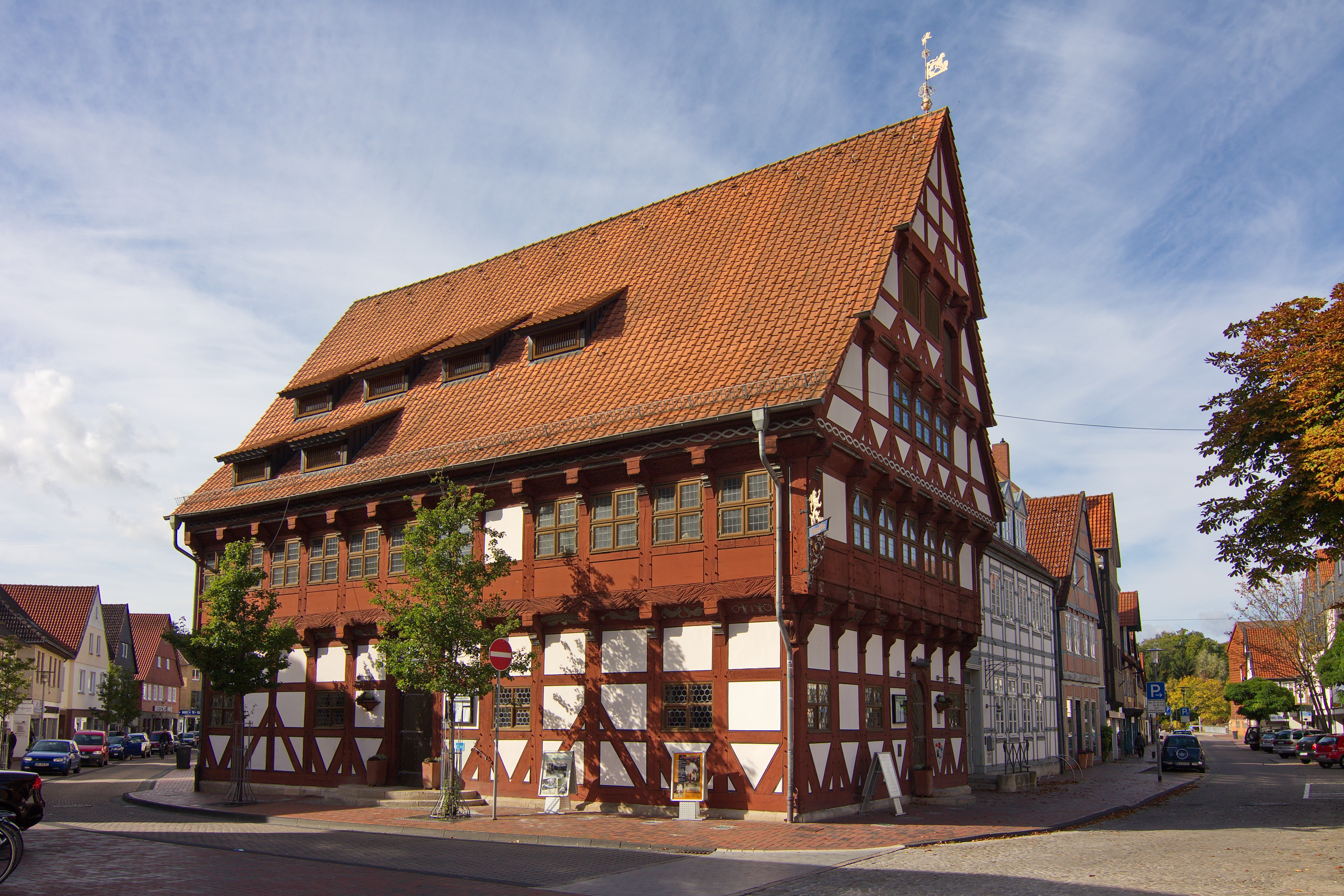 Das Alte Rathaus am Cardenap 1 in Gifhorn wird auf 1562 datiert. Es ist ein Fachwerkbau mit reichem Schnitzwerk. Heute befindet sich die Gaststätte "Ratsweinkeller" in dem Gebäude.